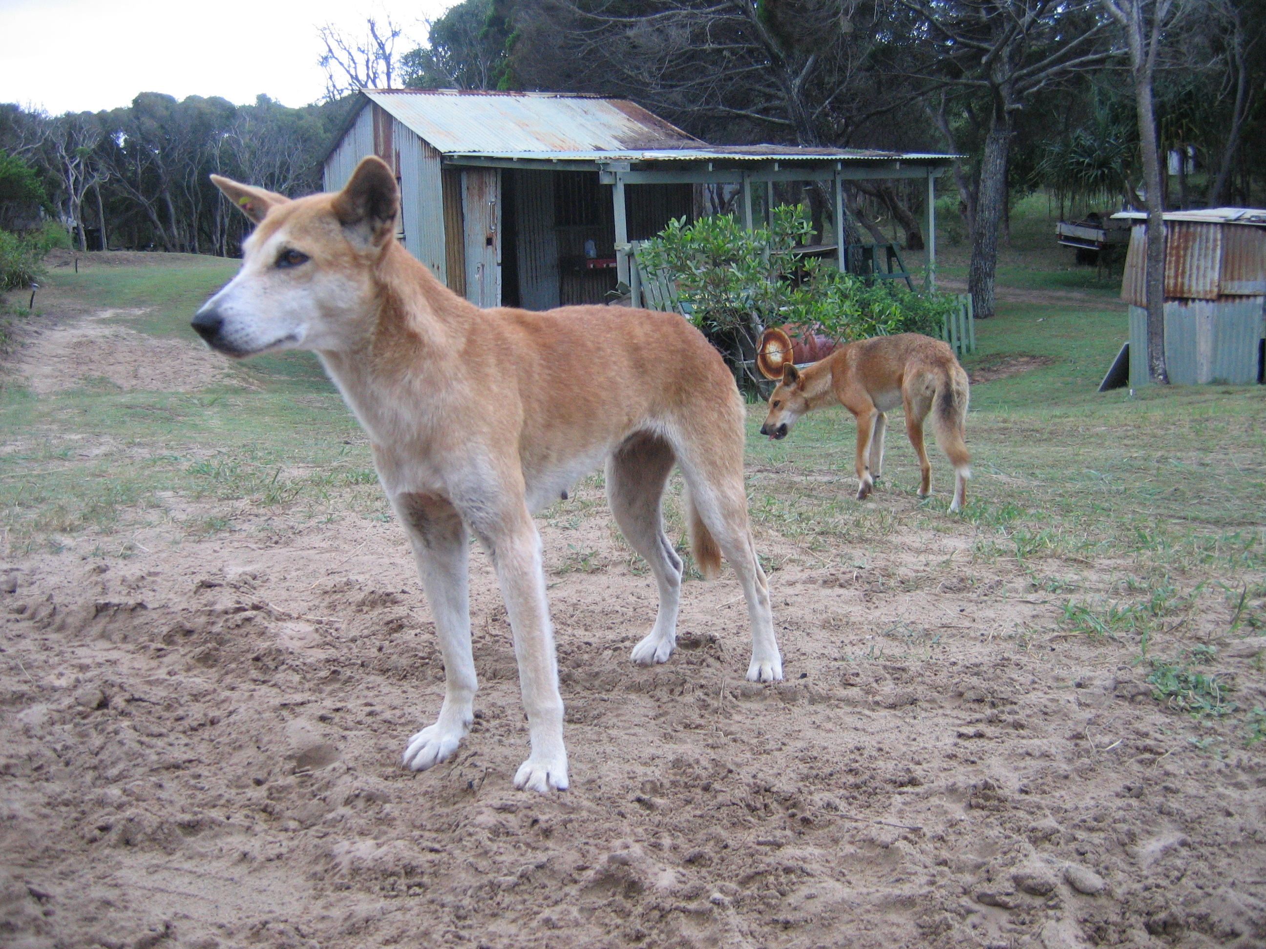 Dingoes at Fraser Island, Queensland, Australia